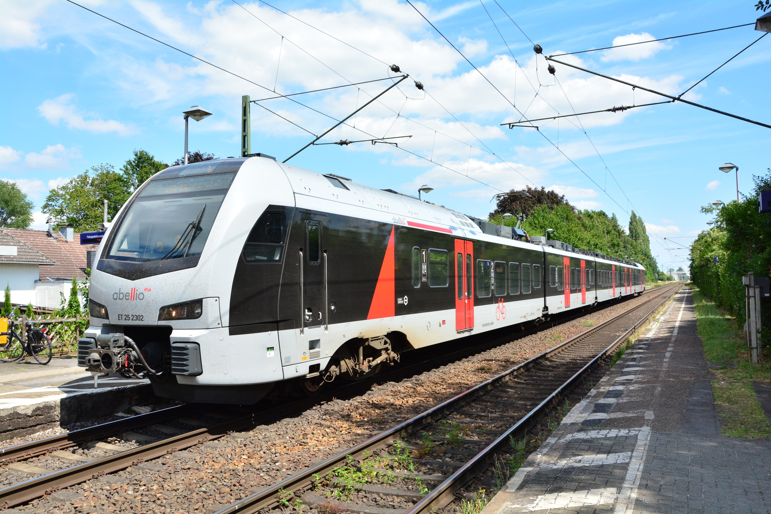 Abellio ET 25 2302 at Praest